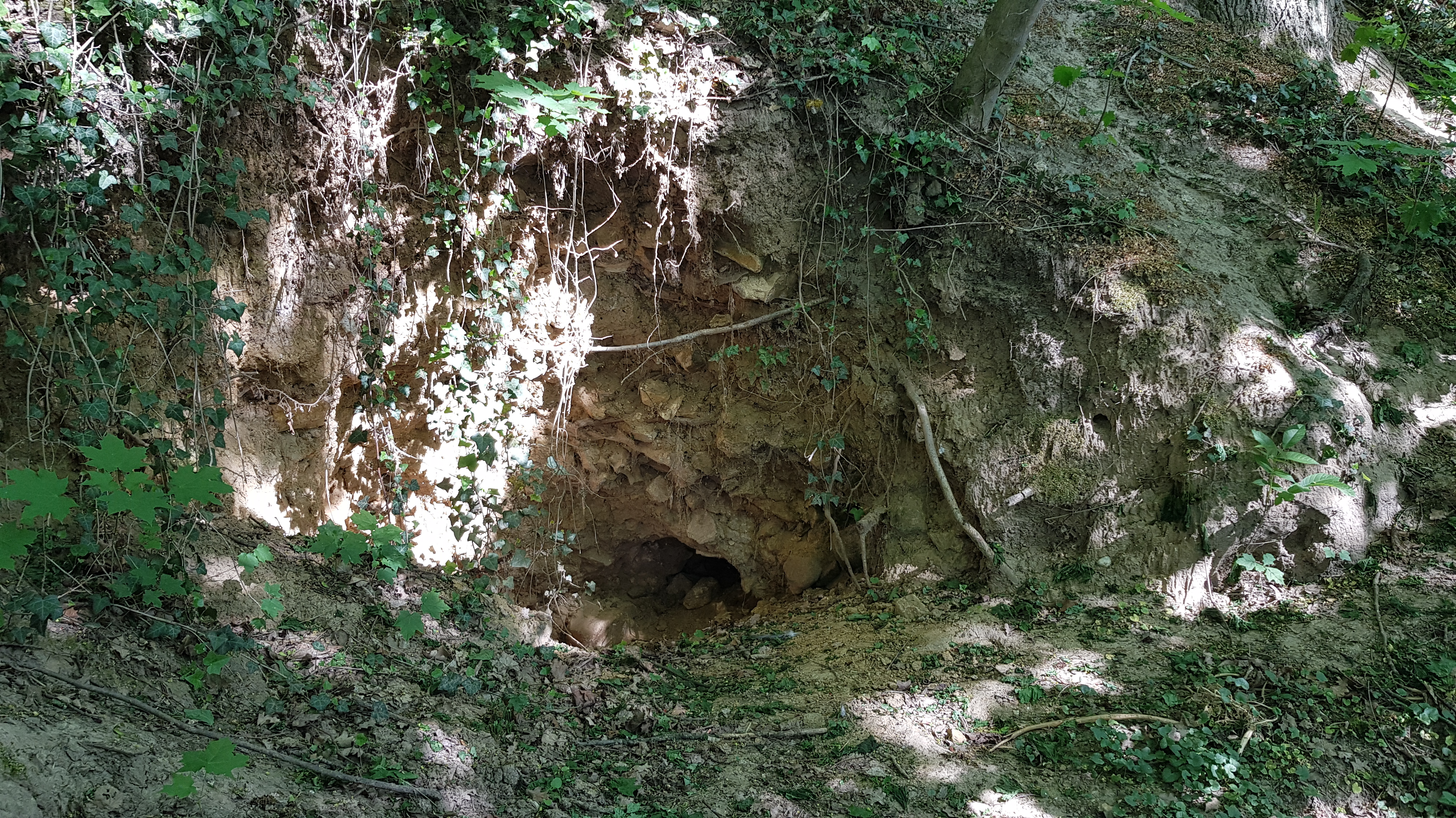 Auvermennekesloak, Craubeek, Nederland